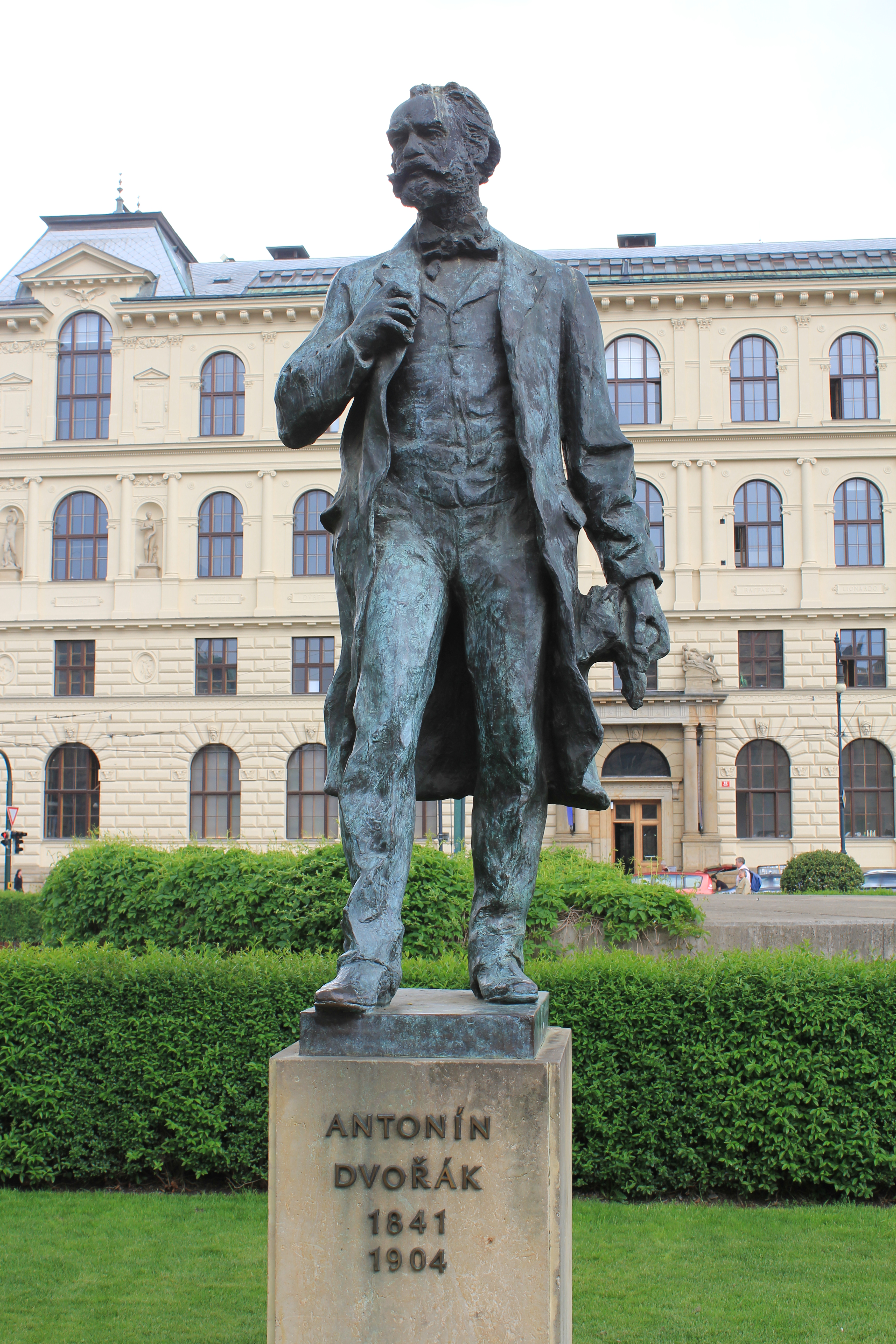 antonin dvorak